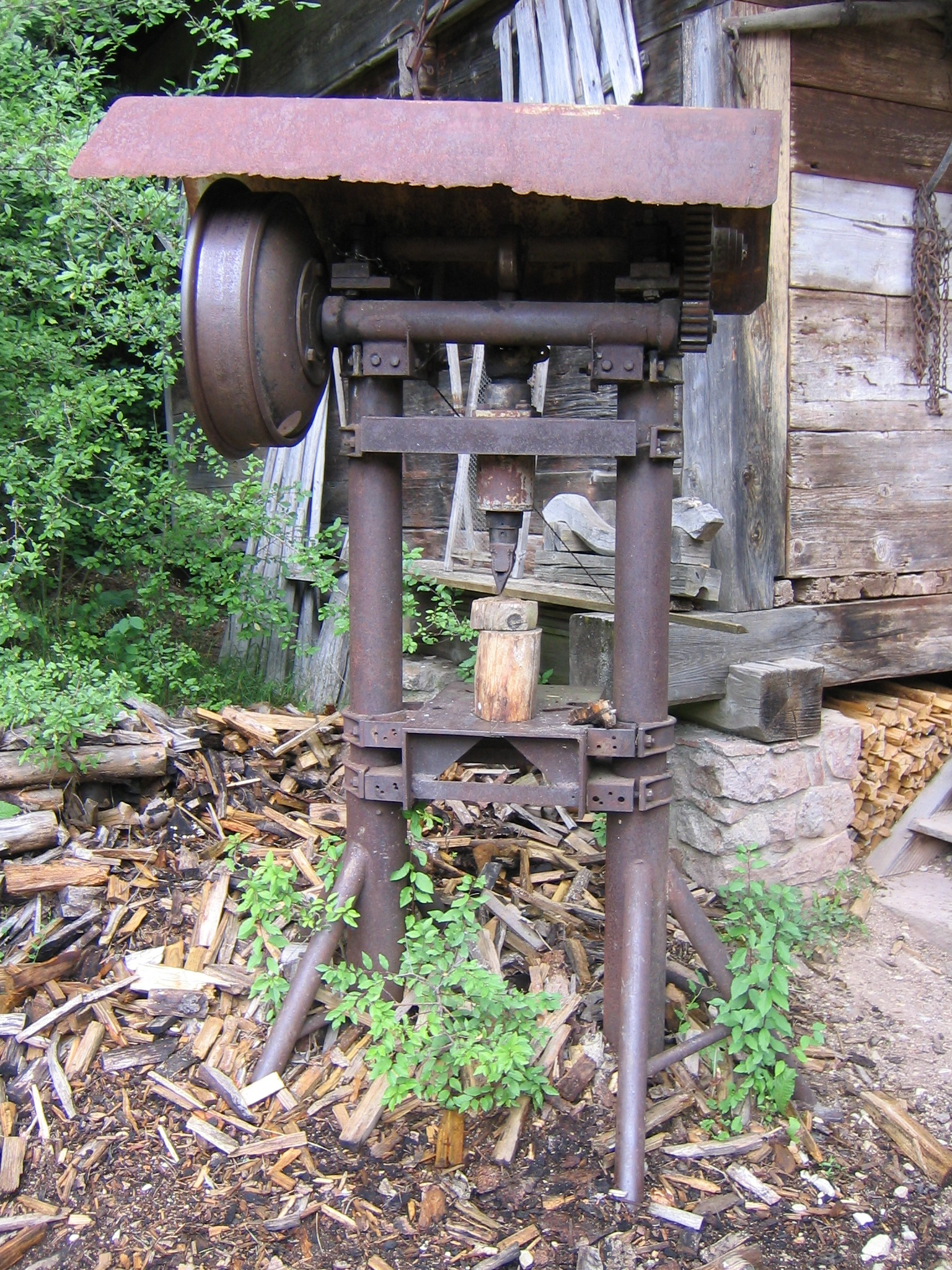 Holzspalter im Freilichtmuseum Neuhausen ob Eck